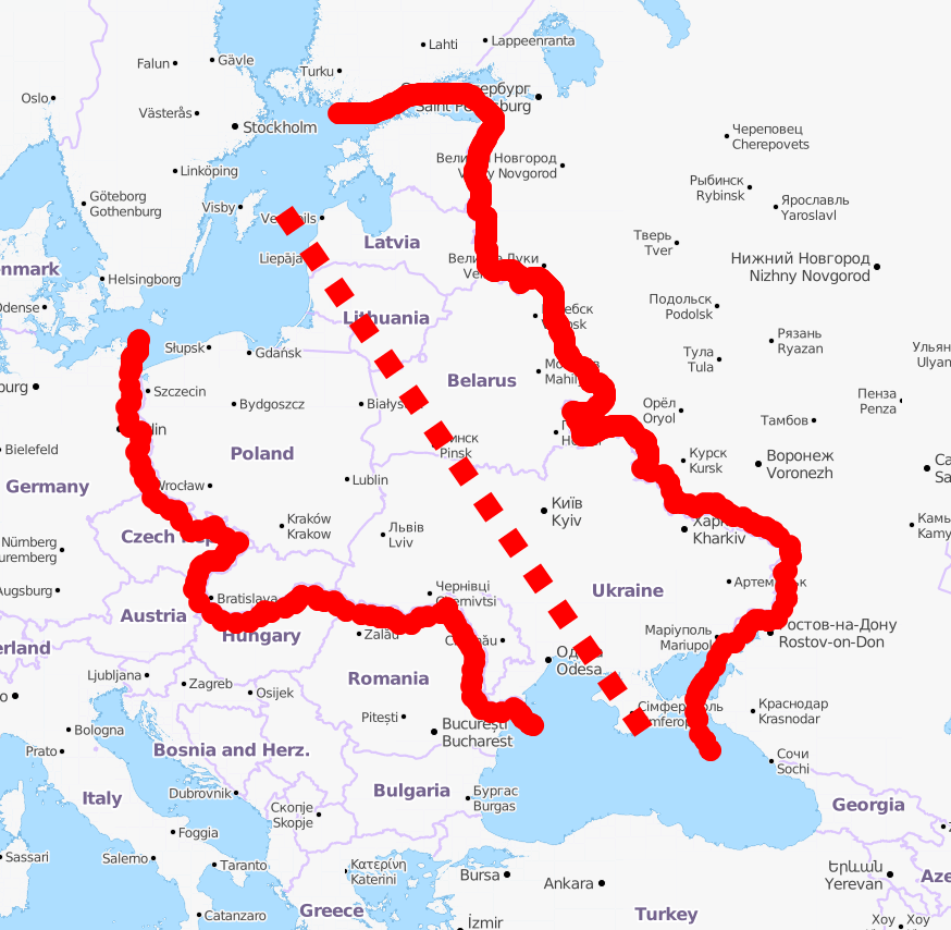 Балто-Чорноморська вісь: Один з варіантів кордонів Балто-Чорноморської вісі.